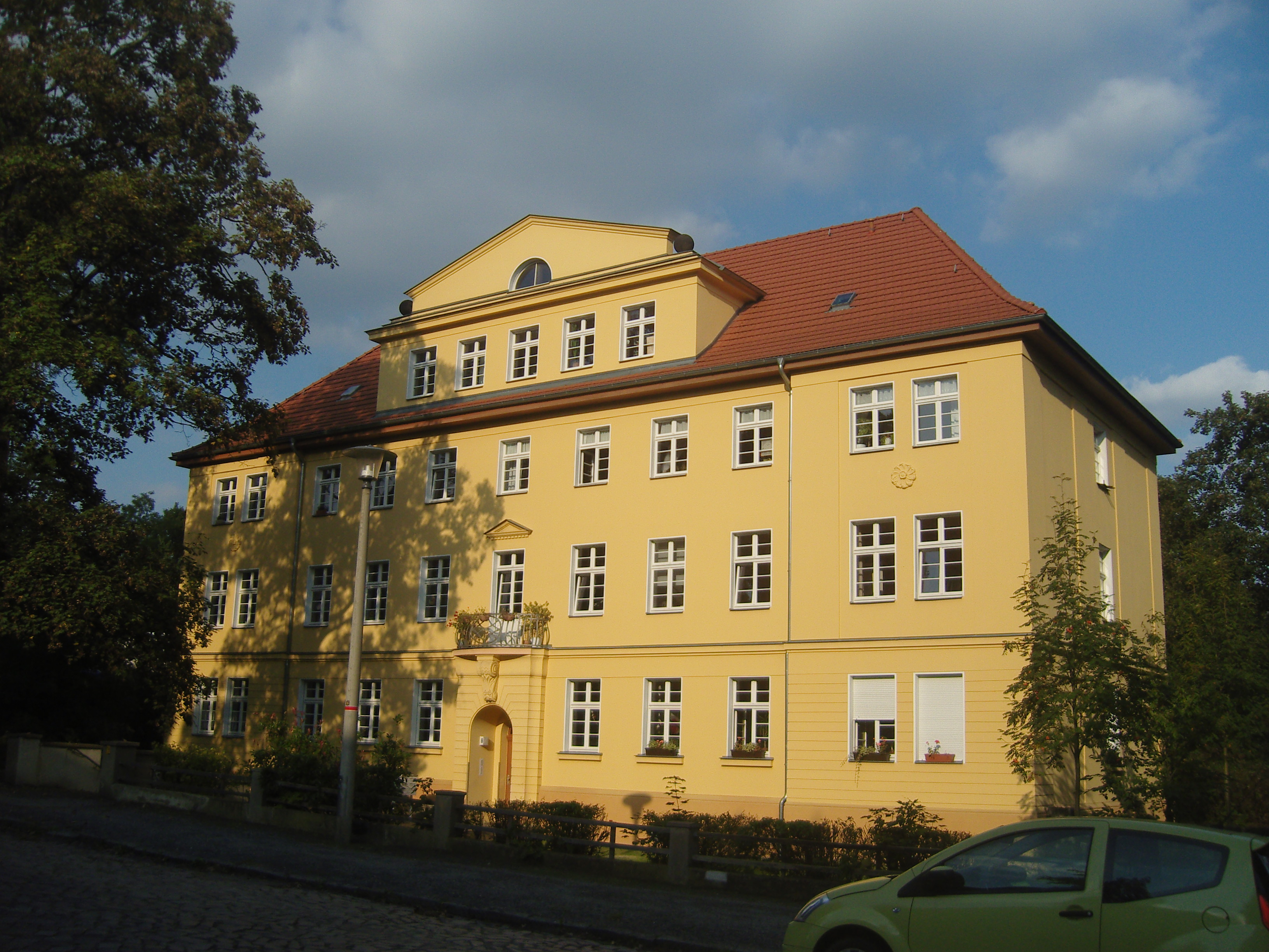 Denkmalgeschütztes Wohnhaus in der Marienallee 8 in Dresden in der Albertstadt